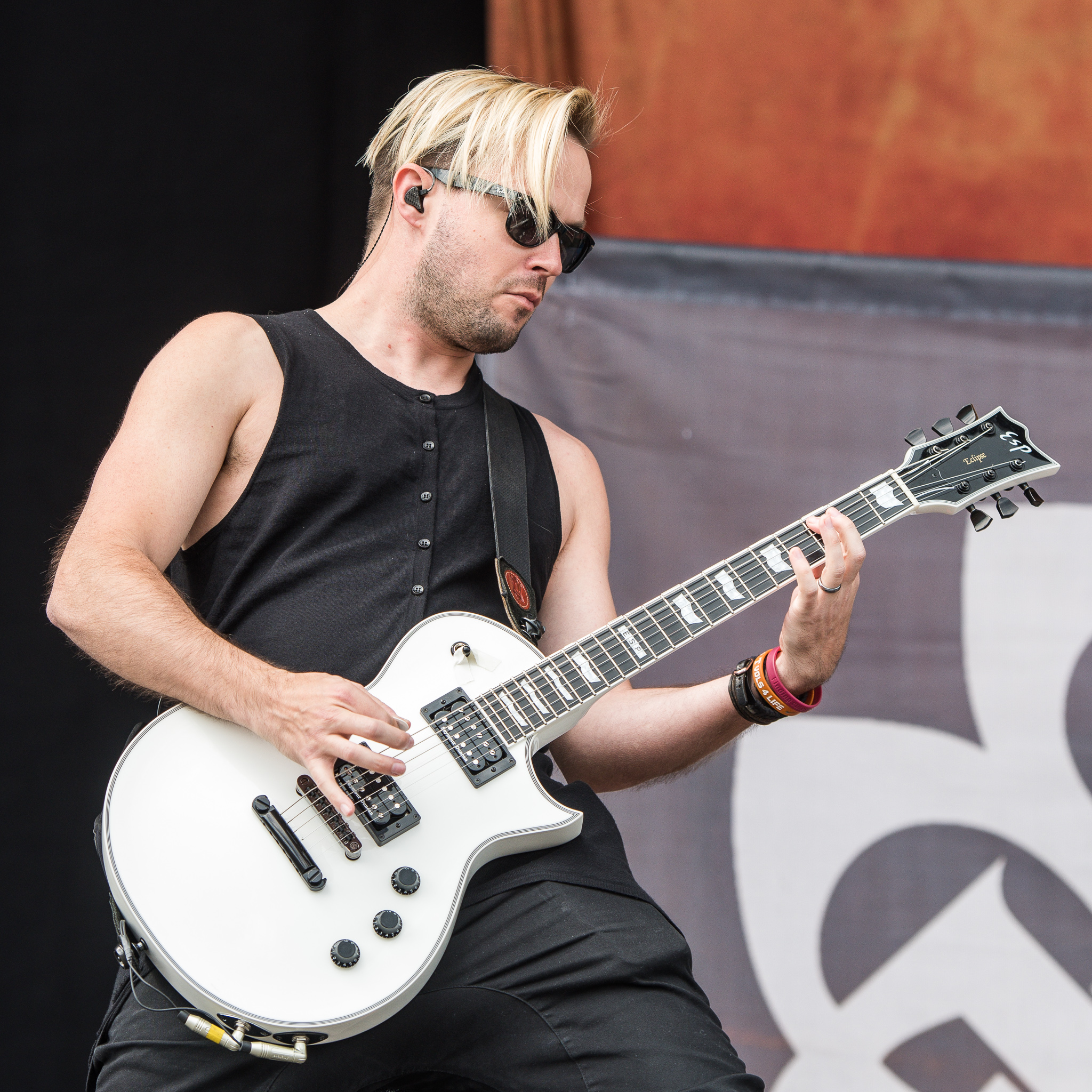 ARGO-Konzerte,Breaking Benjamin,Festival,Keith Wallen,Konzert,Livekonzert,Livemusik,Musik,RiP,Rock im Park 2016,Seat Zeppelin Stage